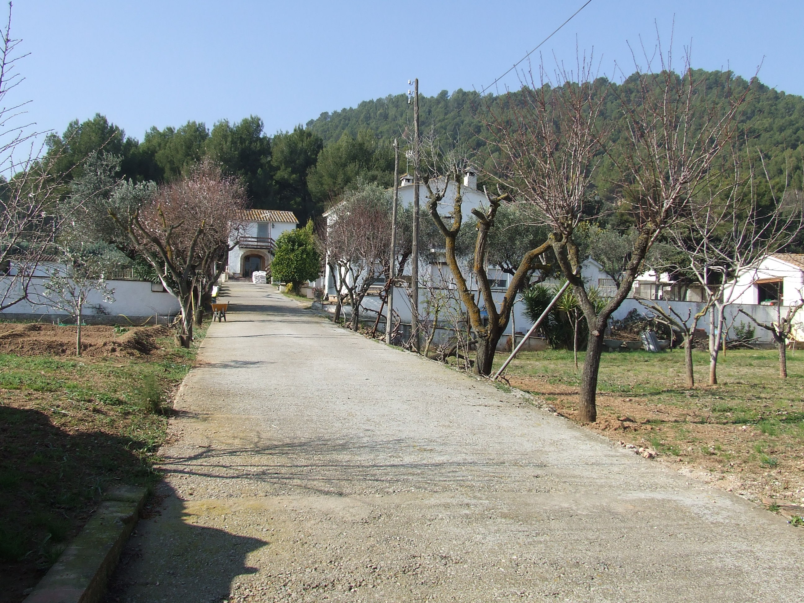 Can Bacardí (Bigues, Bigues i Riells, Vallès Oriental)